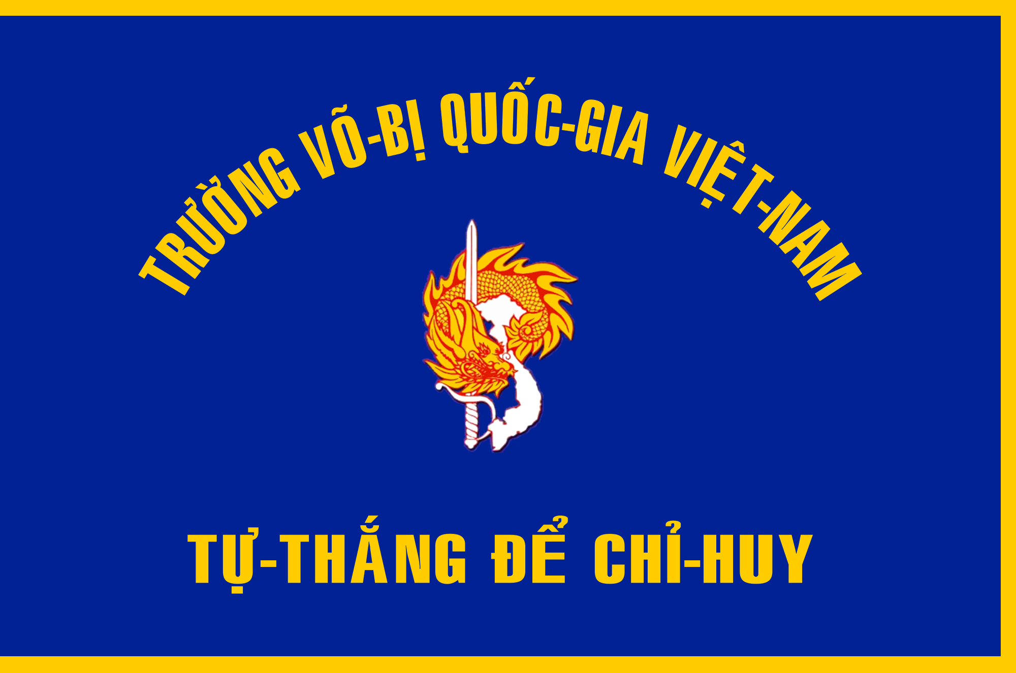 The flag of South Vietnamese National Military Academy (Trường Võ bị Quốc gia Việt Nam), used since 1950 to 1975.